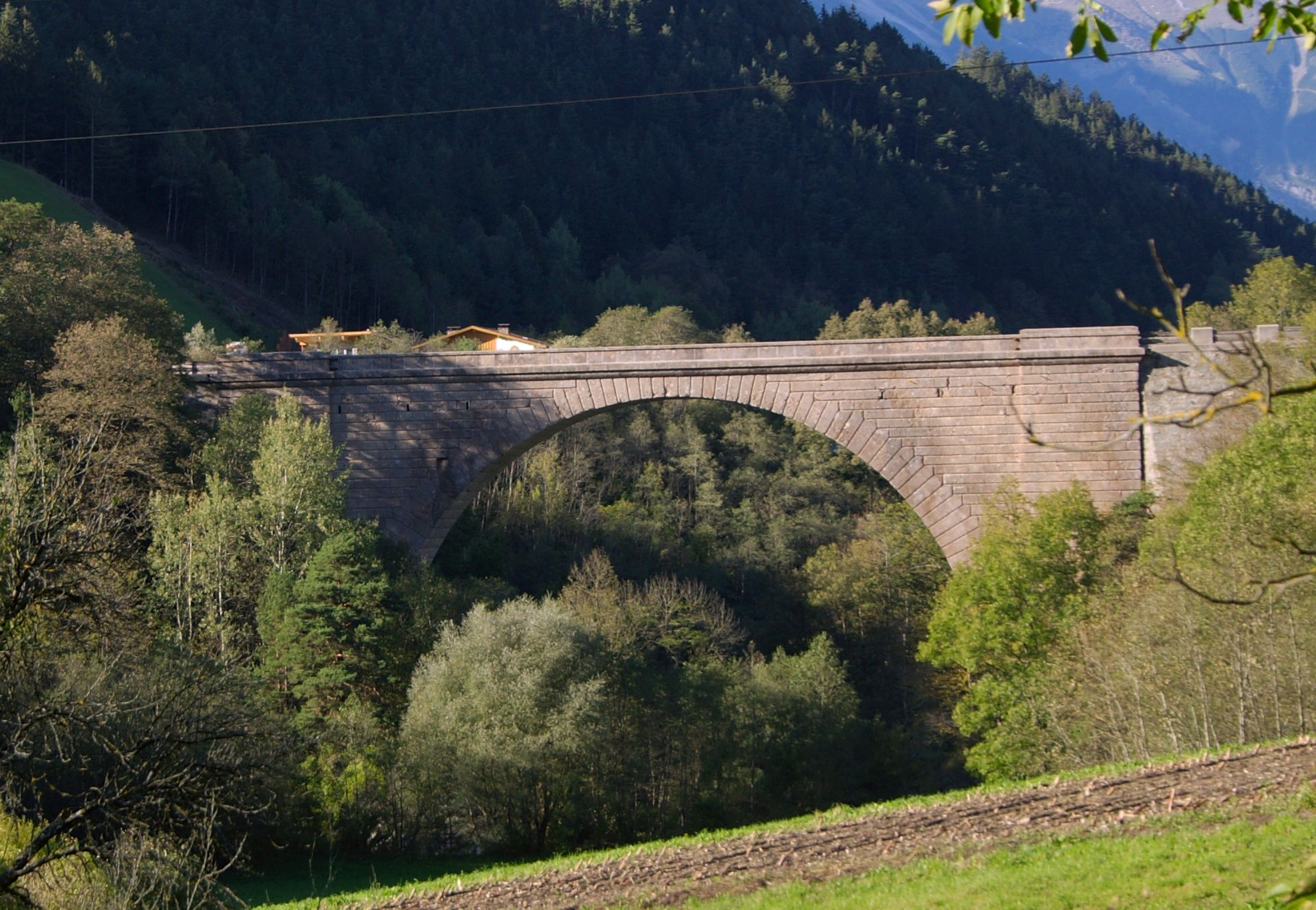 Stephansbrücke near Schönberg, Tirol, Austria Object location47° 12′ 39.5″ N, 11° 23′ 22.53″ E